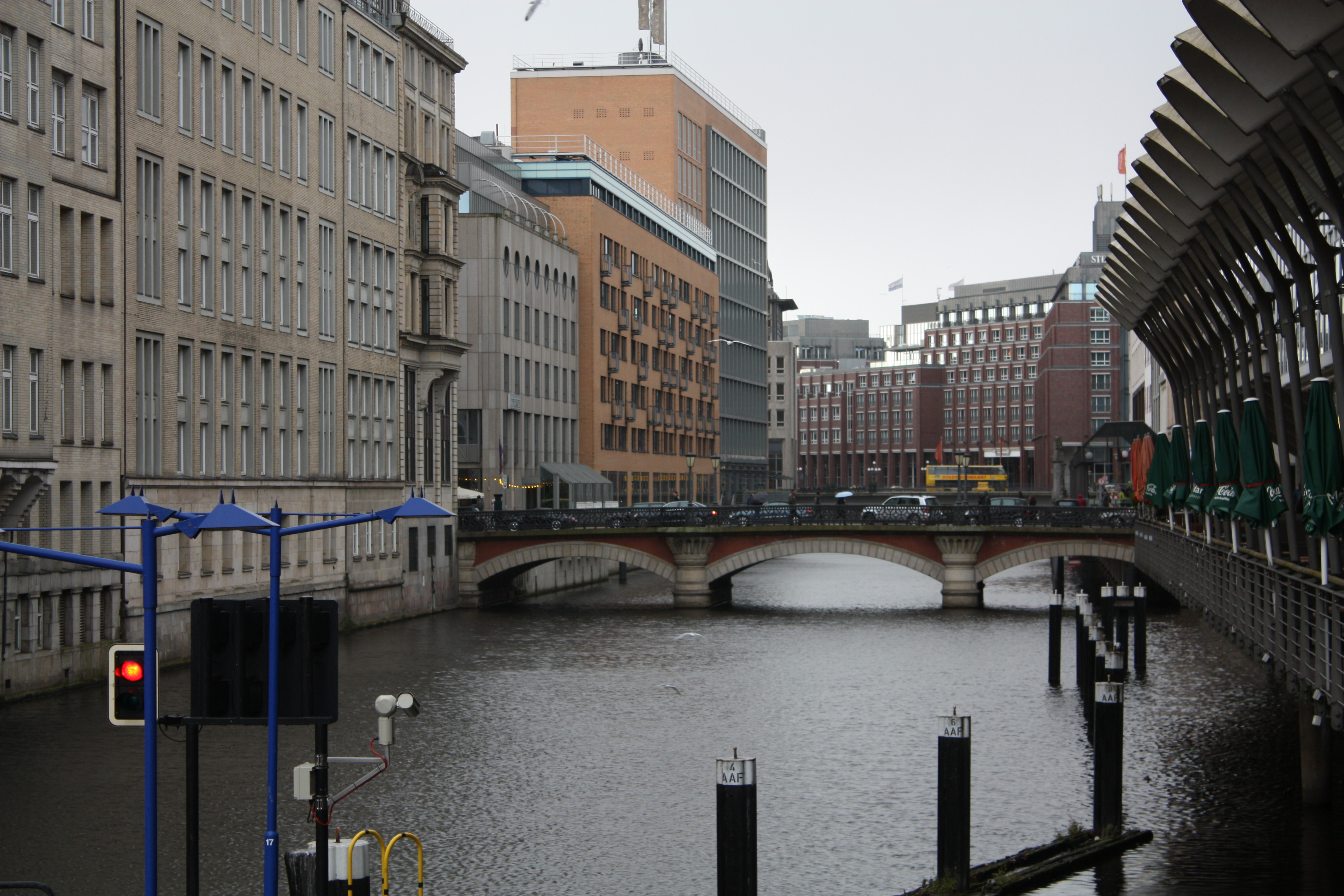 Blick von der Schleusenbrücke nach Süden auf das Alsterfleet in Hamburg. Als nächster Alsterübergang ist die Adolphsbrücke zu sehen. Im Fleet verläuft die Grenze zwischen Hamburg-Altstadt und der Neustadt.